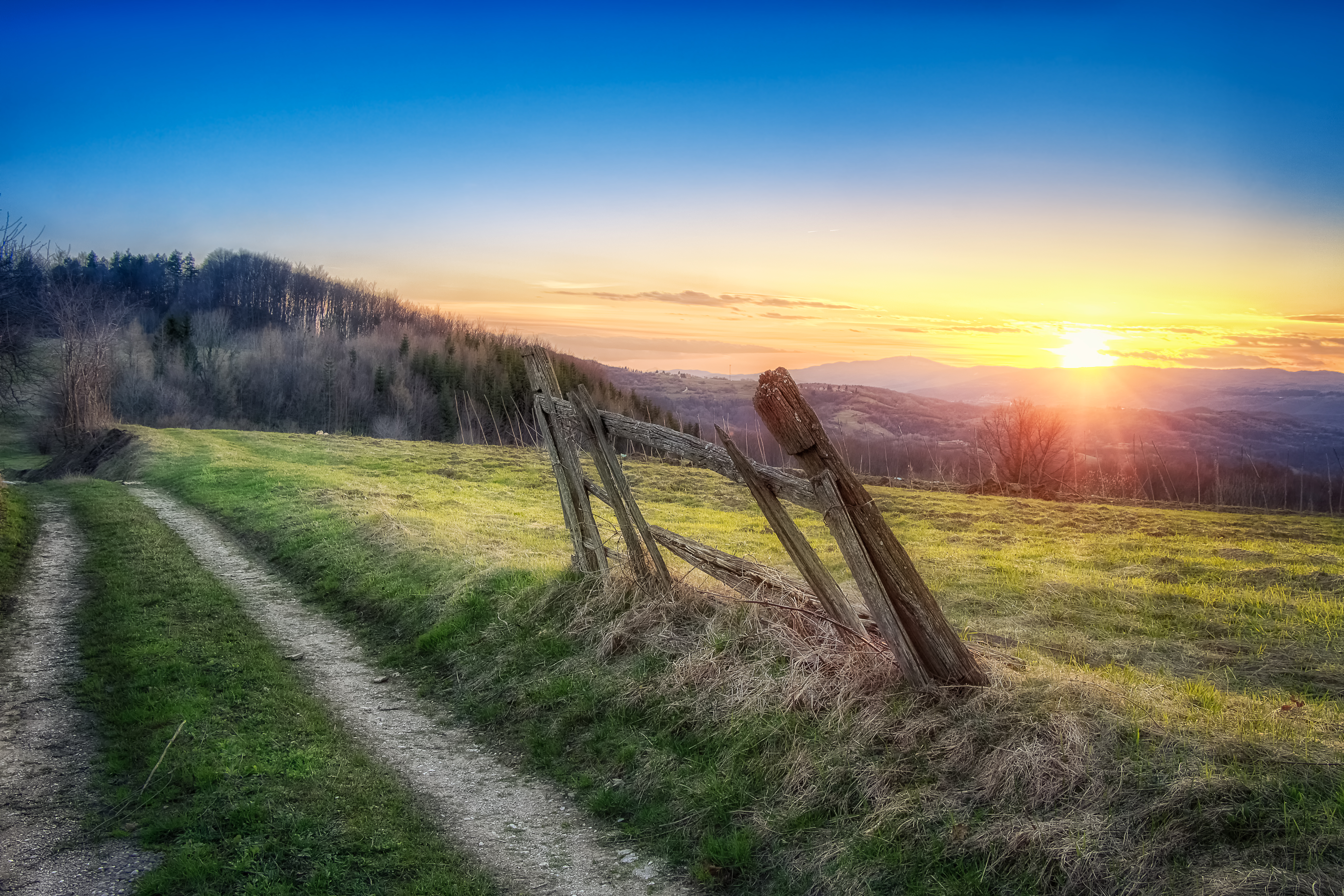 Spring sunset @ Dragonos village